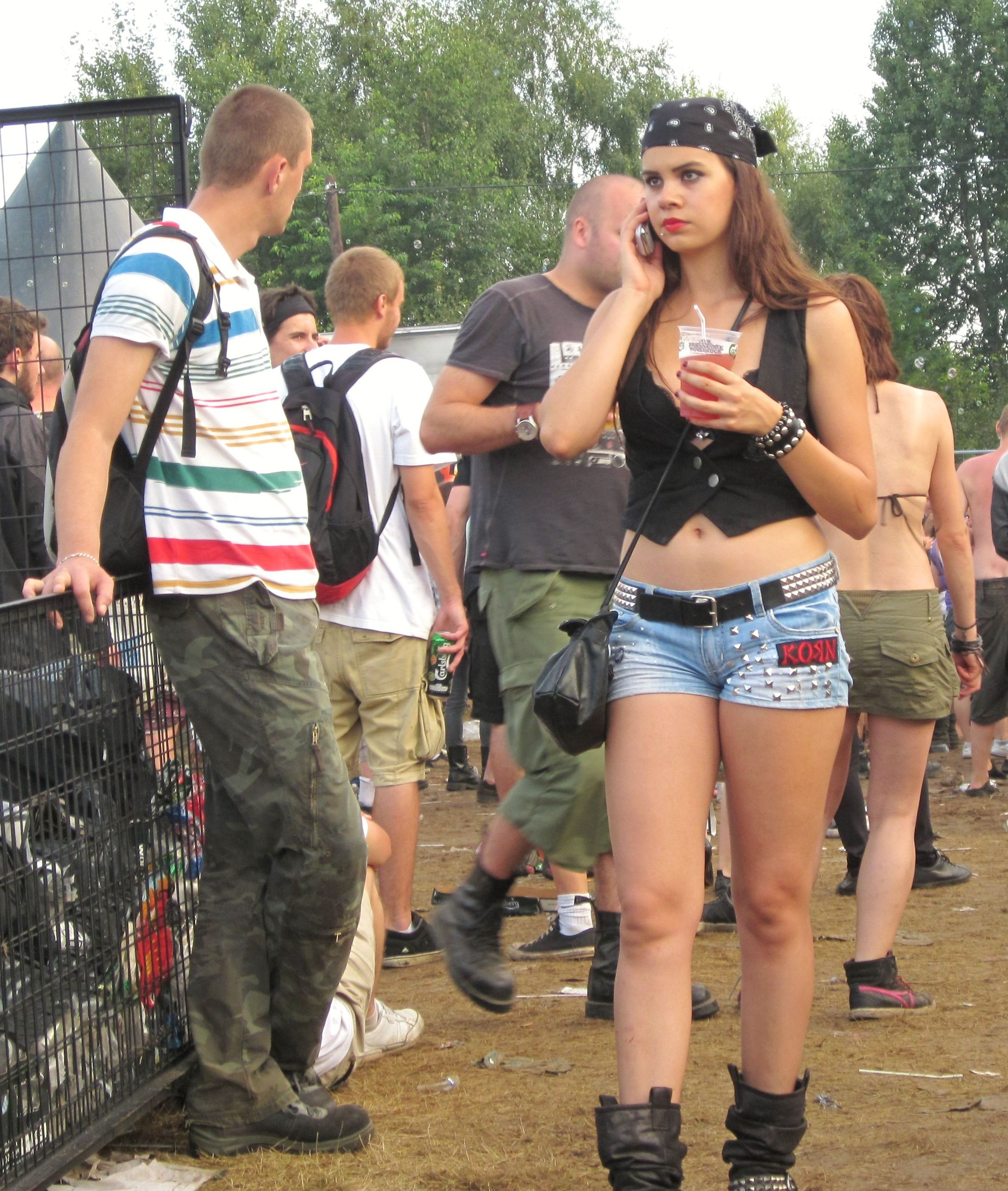 Przystanek Woodstock 2011